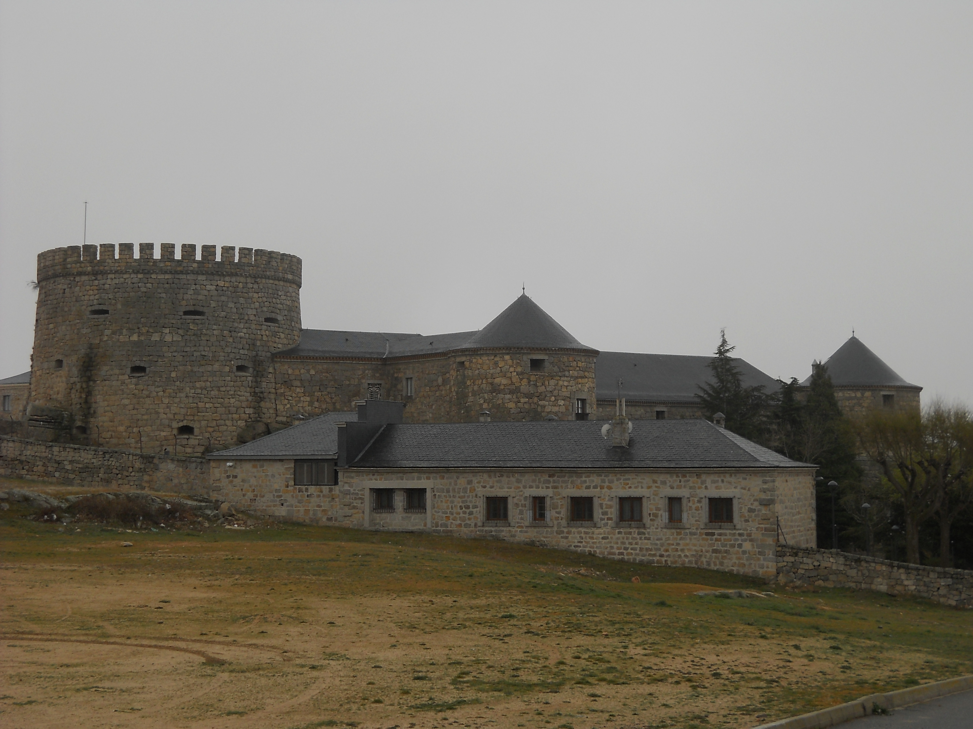 Castillo-Palacio de Magalia, Las Navas del marqués, Ávila, España